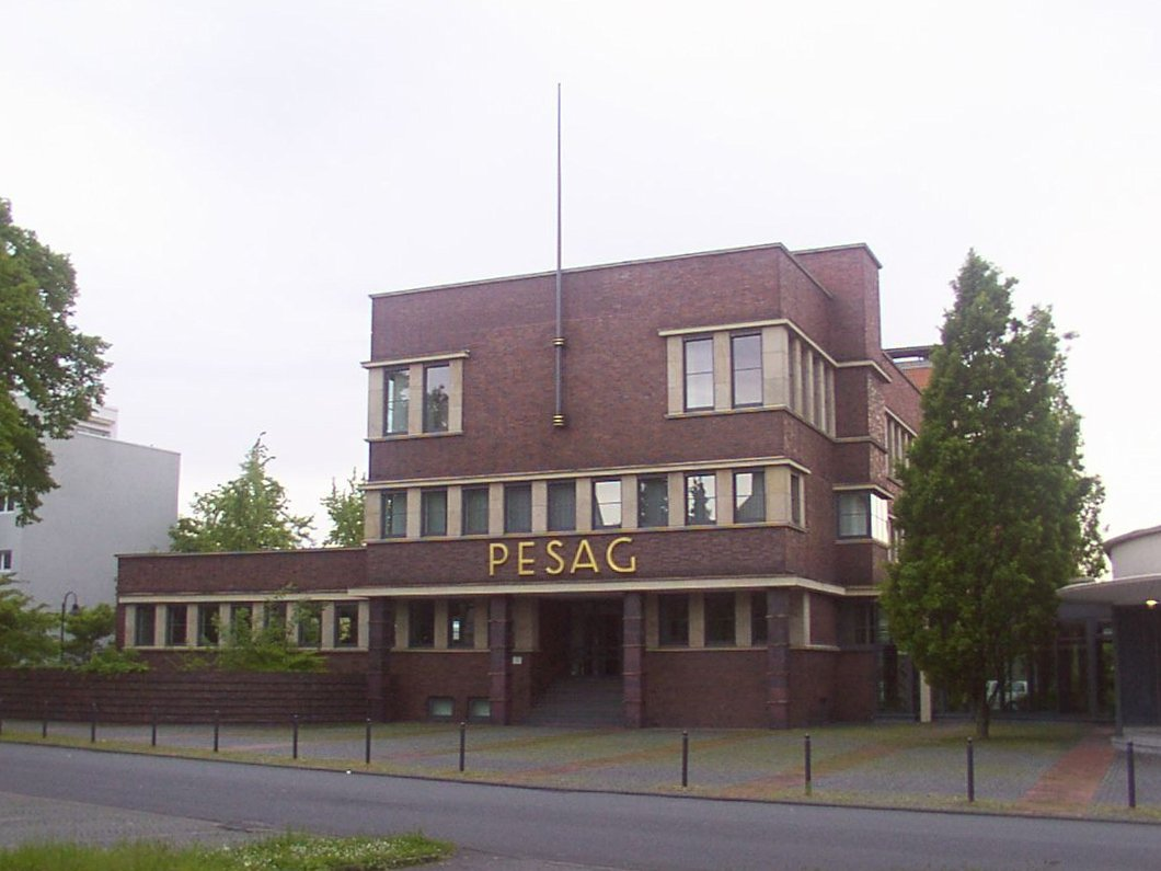 Paderborn: Verwaltungsgebäude der ehemaligen PESAG, heute e.on Westfalen-Weser This is a photograph of an architectural monument.